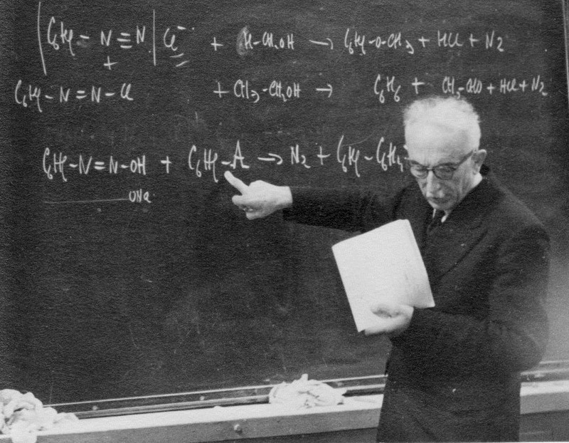 R CORNUBERT pendant son cours en mai 1958 à Nancy